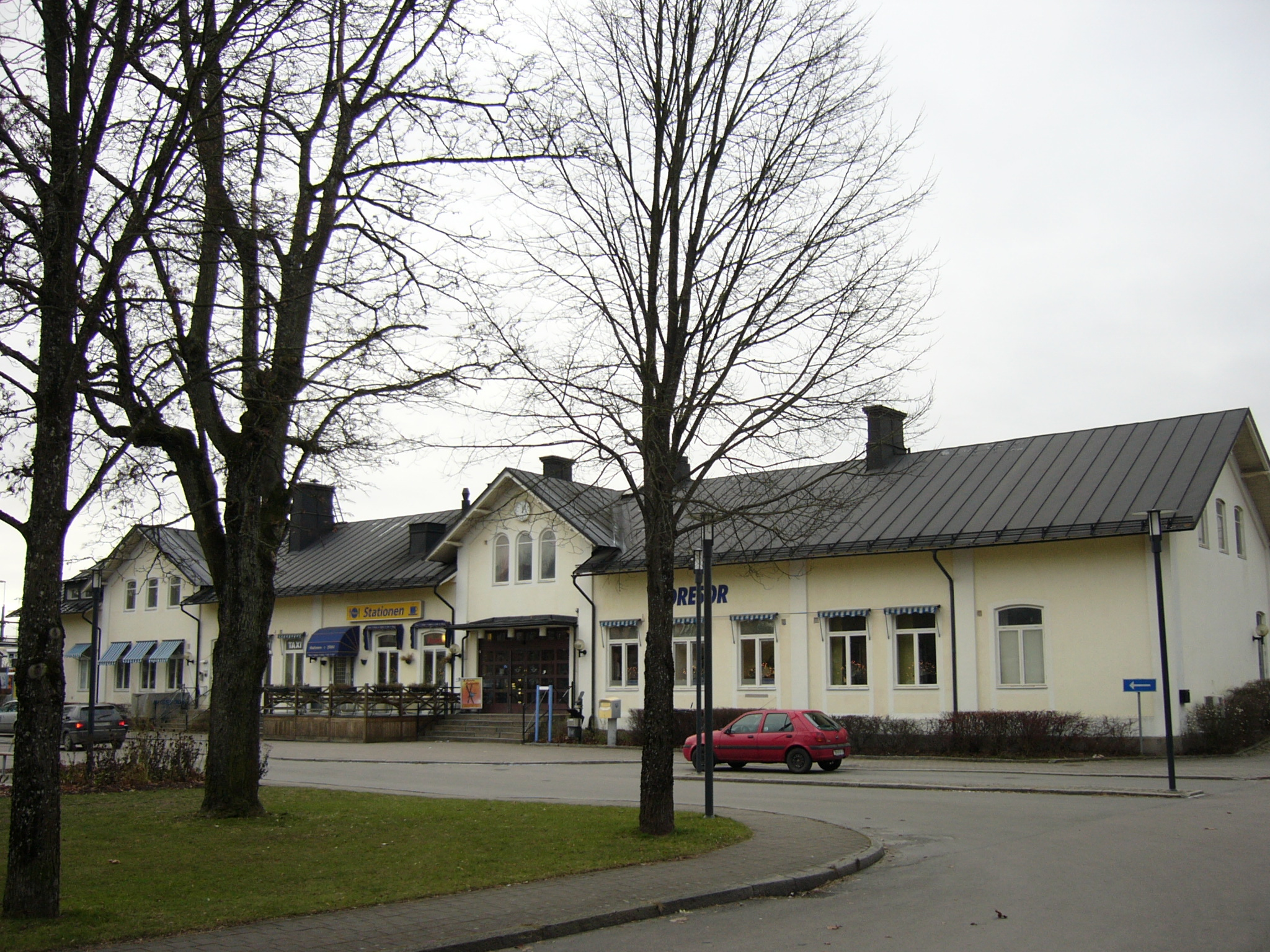 Järnvägsstationen i Älmhult, Railroad station Älmhult